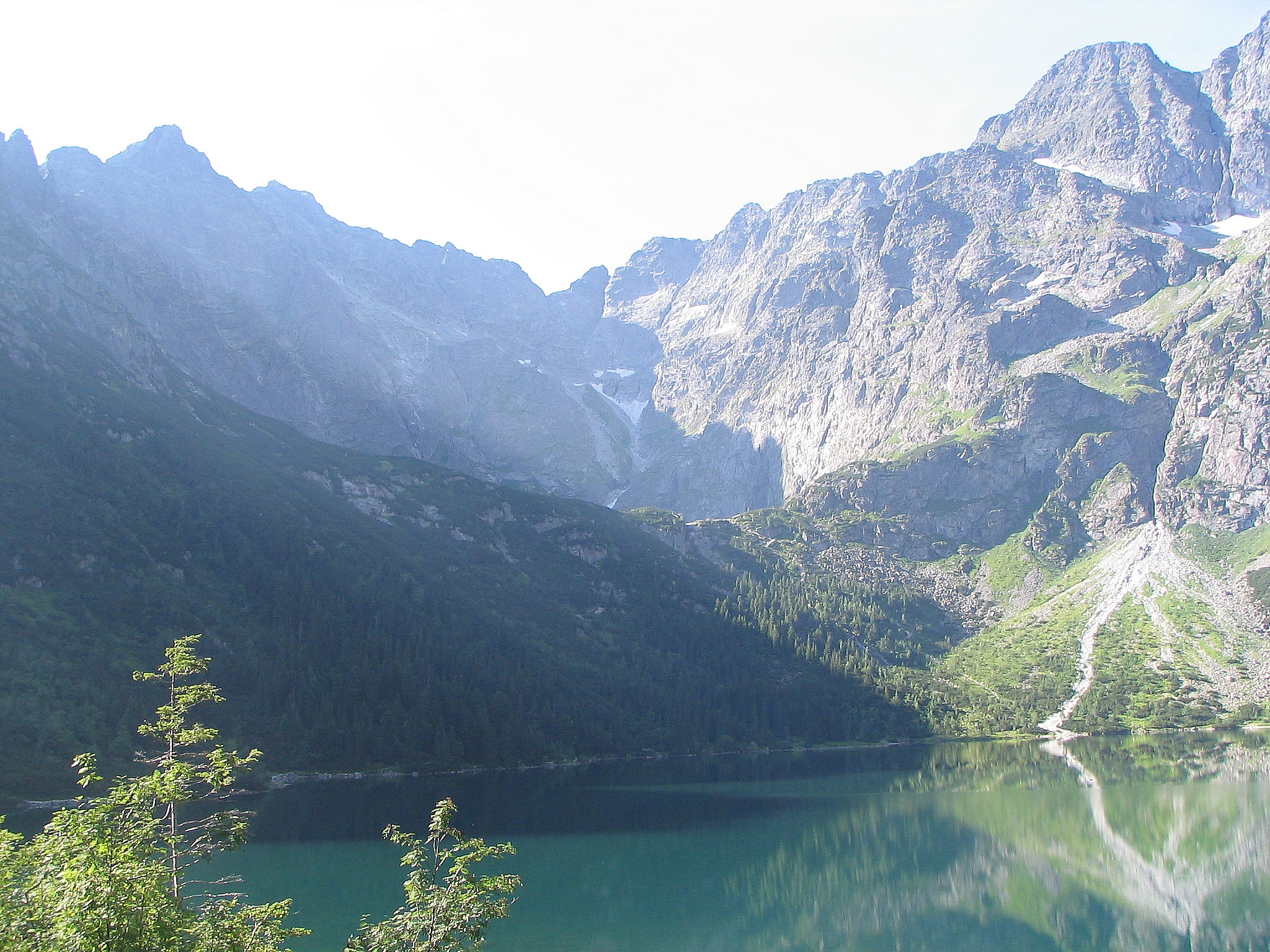 Widok z nad Morskiego Oka. Od lewej: Niżnie Rysy, Rysy, Żabi Koń, Żabia Turnia Mięguszowiecka, Wołowa Turnia, Mięguszowiecki Szczyt Czarny